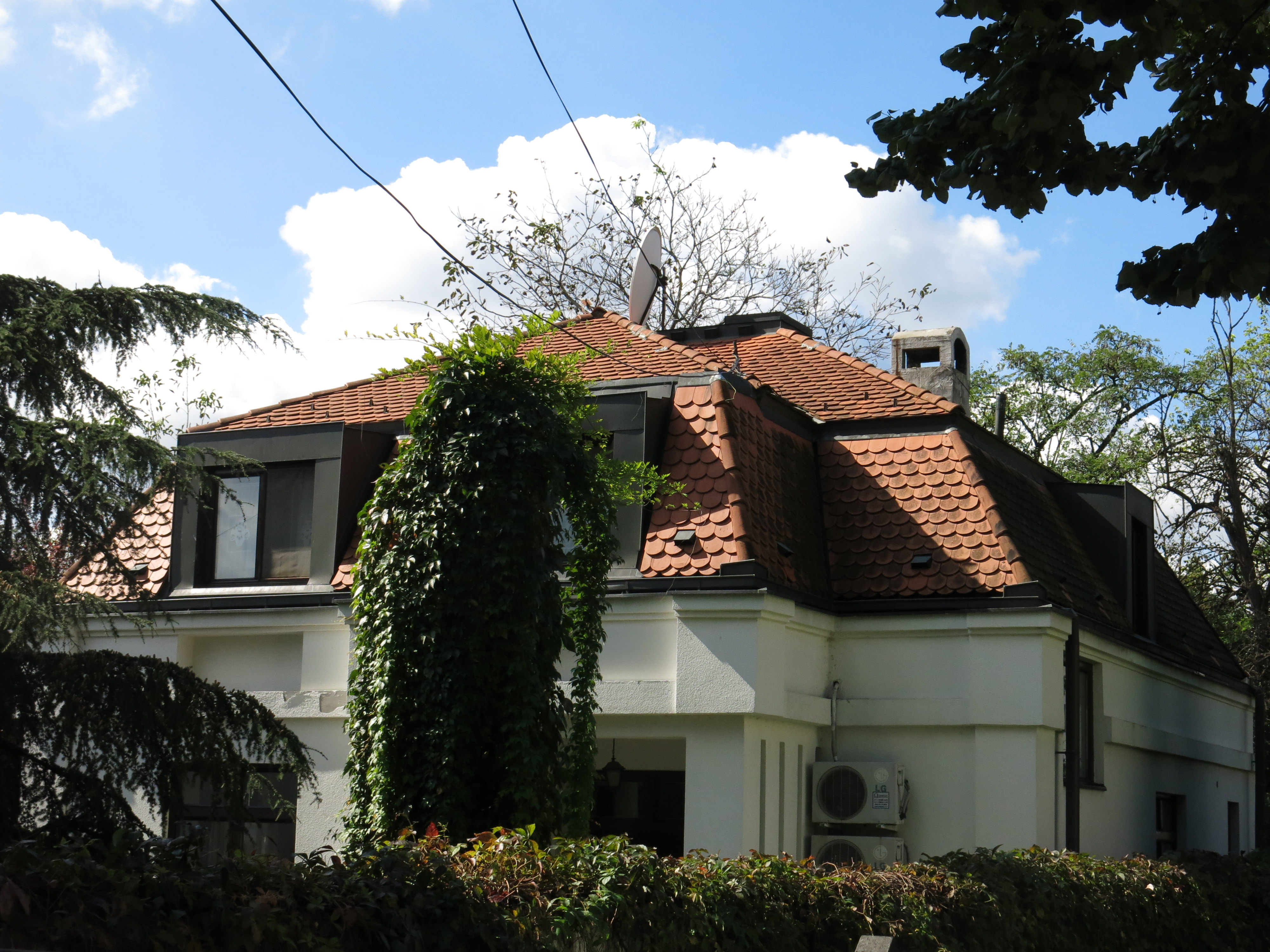 Кућа Исидоре Секулић